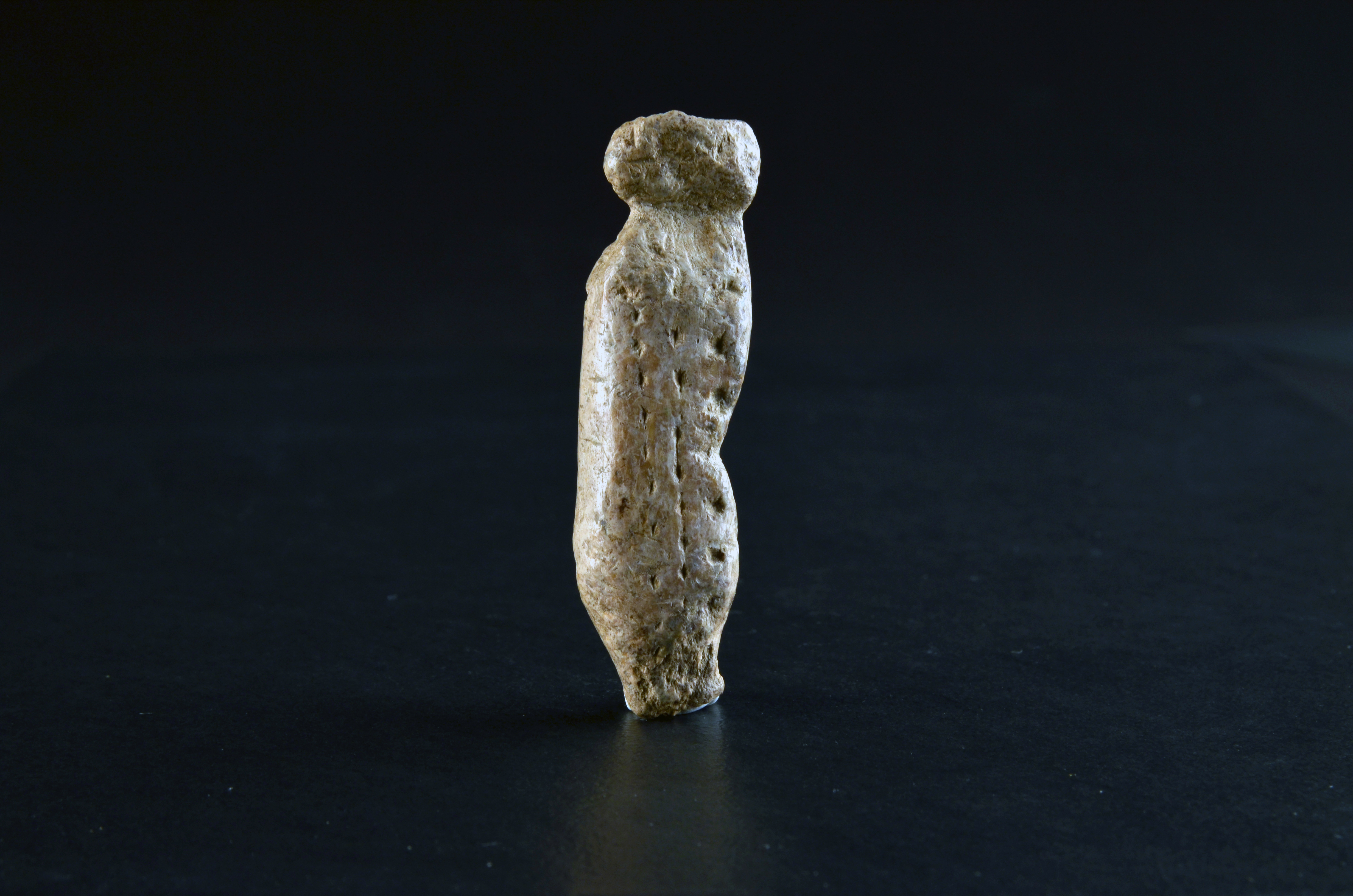 Anthropppp